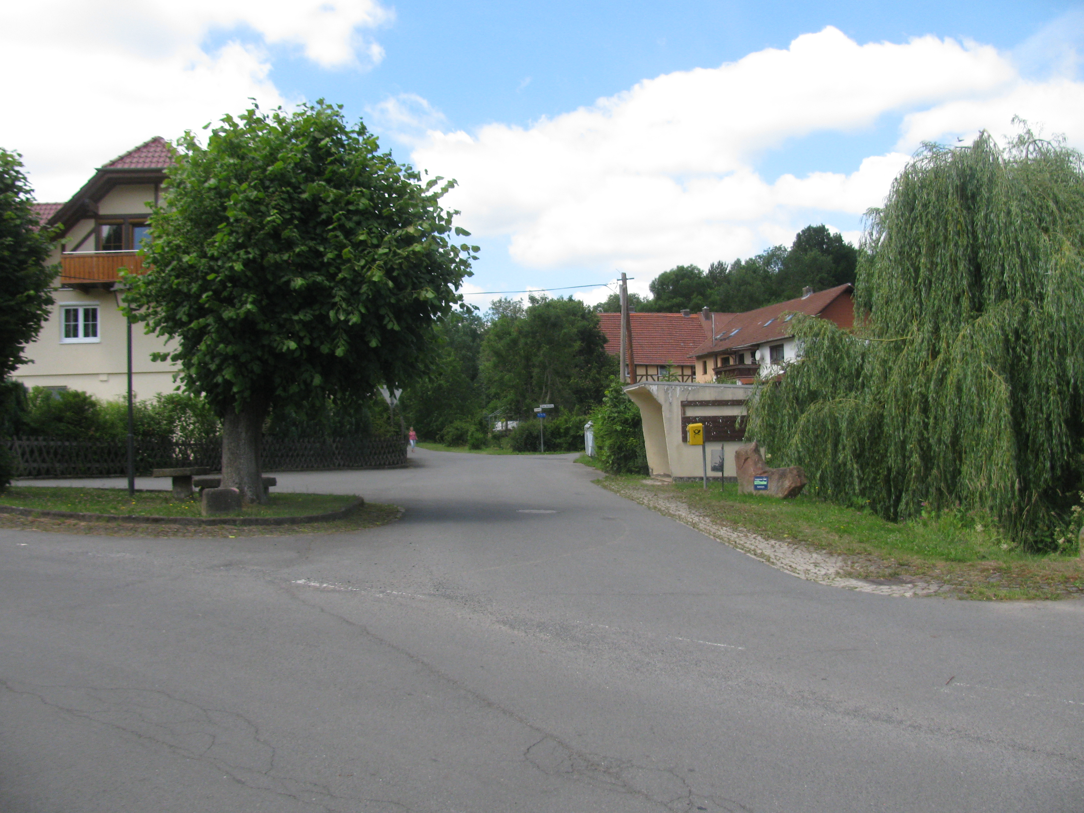 die Bushaltestelle in Hessisch-Lichtenau-Hollstein